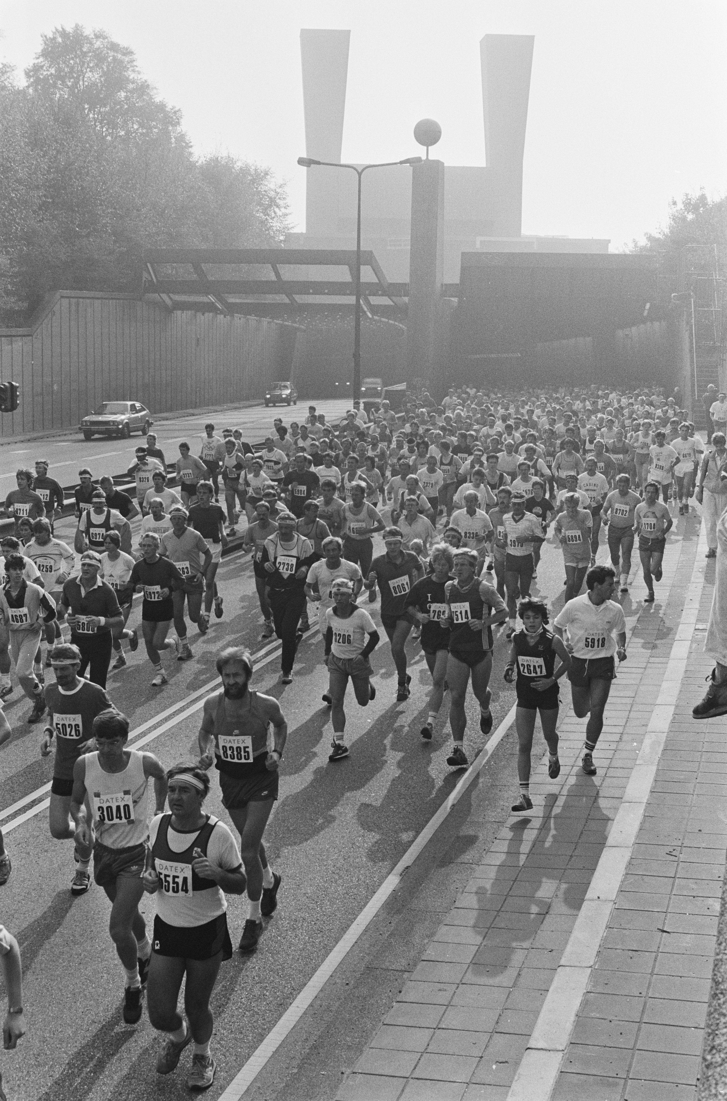 Collectie / Archief : Fotocollectie Anefo Reportage / Serie : [ onbekend ] Beschrijving : Dam-tot-Damloop; lopers komen uit IJ-tunnel Datum : 12 oktober 1986 Fotograaf : Bogaerts, Rob / Anefo Auteursrechthebbende : Nationaal Archief Materiaalsoort : Negatief (zwart/wit) Nummer archiefinventaris : bekijk toegang 2.24.01.05 Bestanddeelnummer : 933-7870